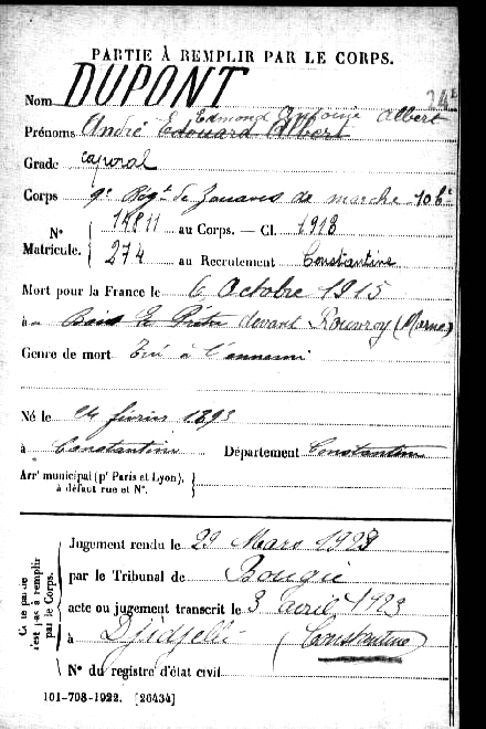 Cerificat de déces d'André Dupont, pied-noir de Constantine, mort pour la France le 6 octobre 1915 à Rouvroy-Ripont dans la Marne durant la première guerre mondiale.